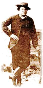 Sayhueque en Buenos Aires, 1885